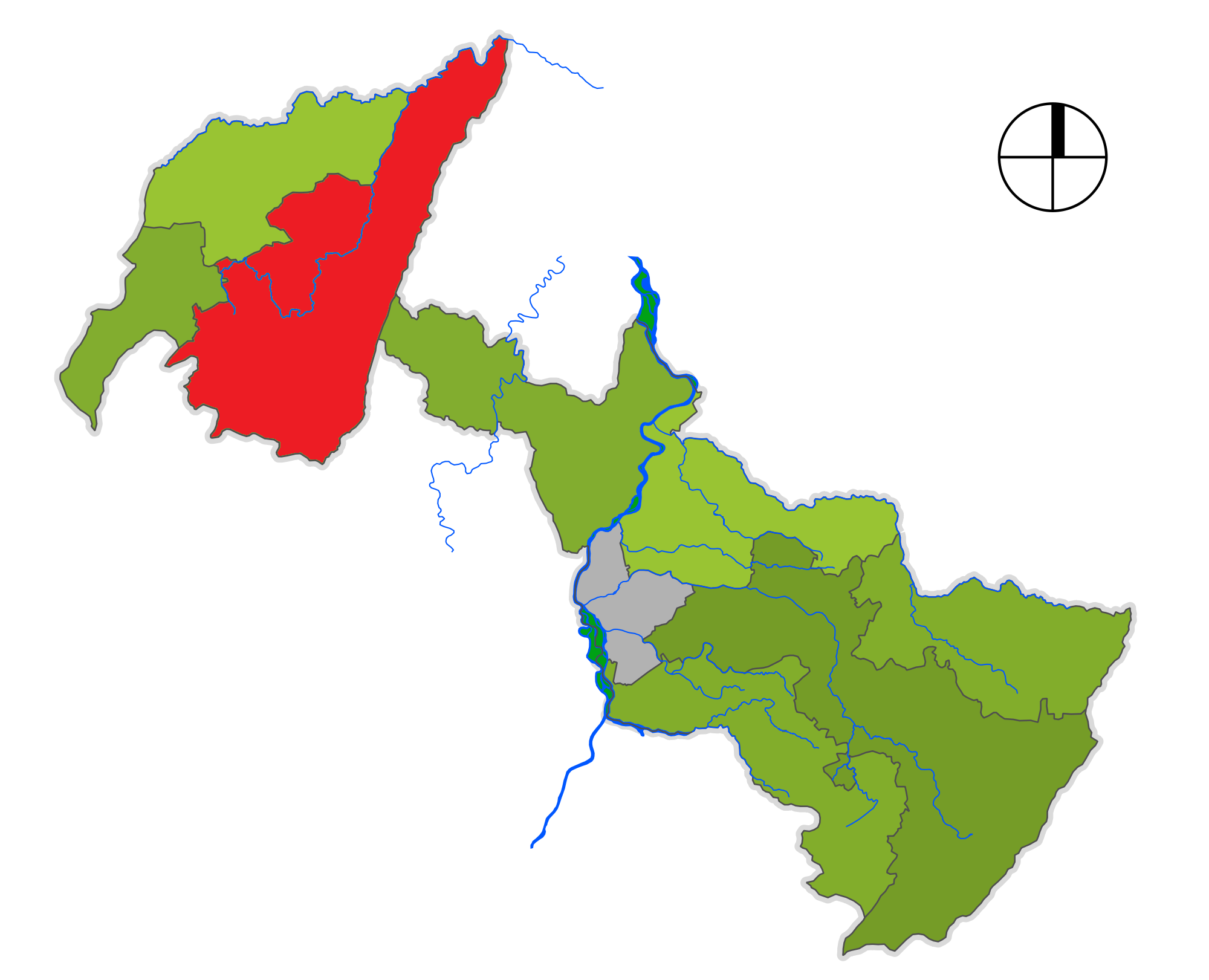 Corregimiento de Neiva San Luis, departamento del Huila, Colombia.